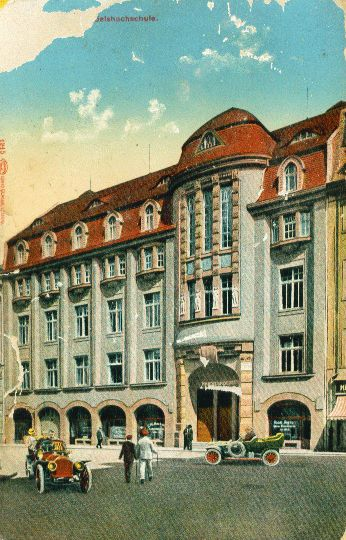 Handelshochschule Leipzig. Gebäude Ritterstraße 8-10 auf einer Ansichtskarte nach Fertigstellung des 1908-1910 (errichteten Hauses von Fritz Schumacher. Heute Geschwister Scholl-Haus, durch das Institut für Kunstpädagogik der Universität Leipzig genutzt.